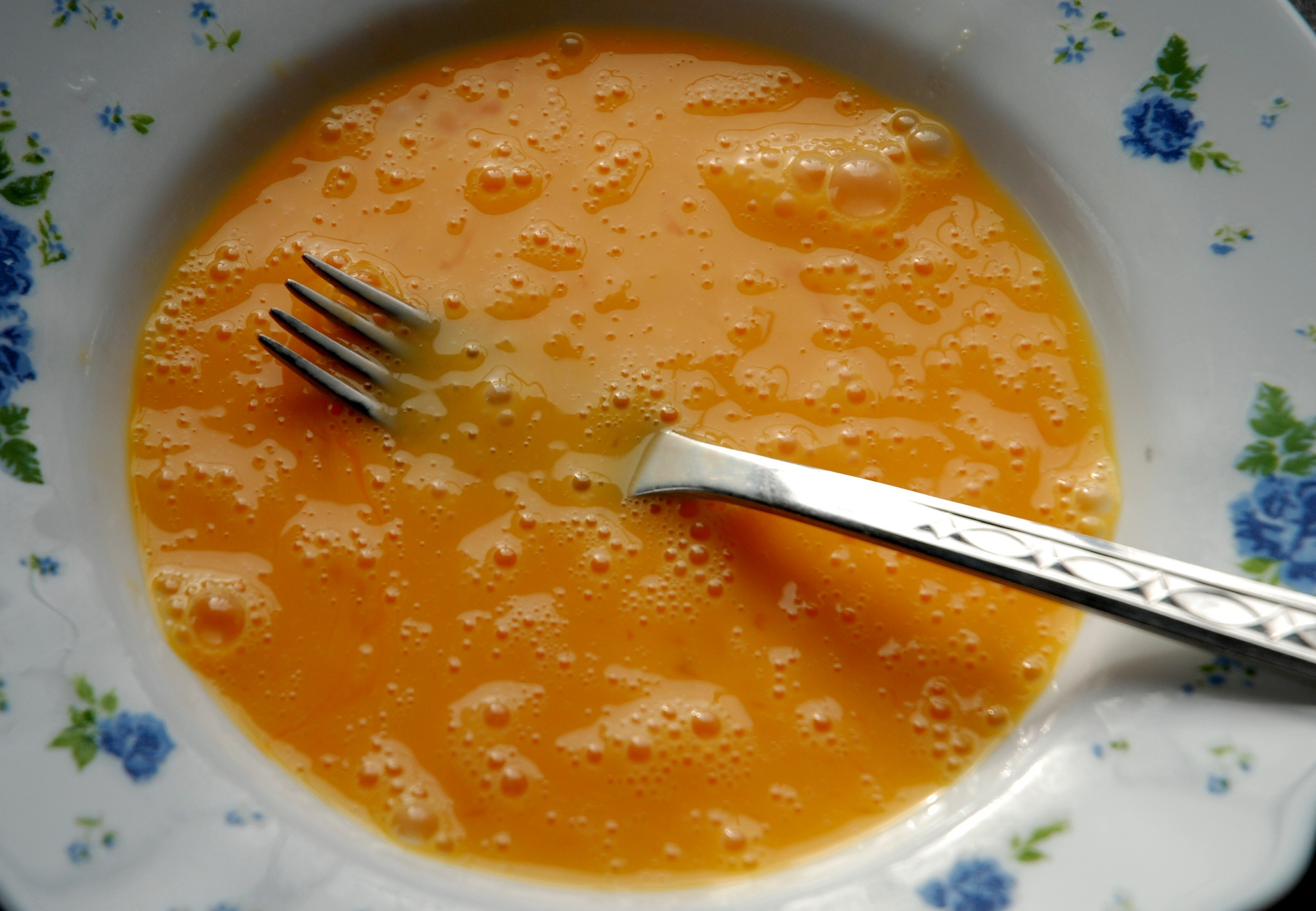 Slepičí vejce